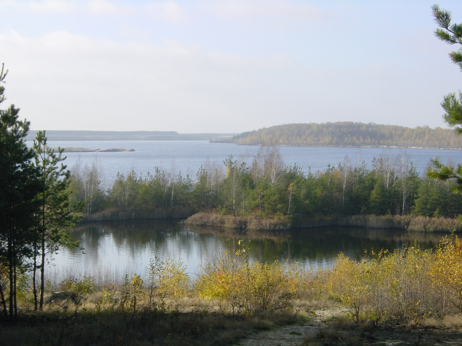 Partwitzer See, geflutetes Tagebaurestloch in Sachsen und Brandenburg